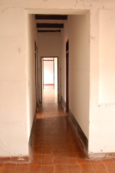 Acto de recuperación del terreno donde función el Centro Clandestino de Detención (CCD) de La Perla, Córdoba.